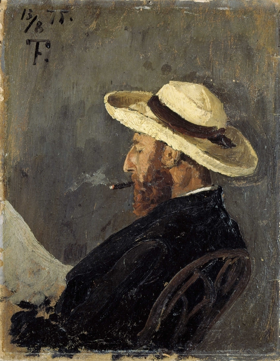 Sittende i stol. Brystbilde. Venstre profil sett halvveis bakfra. På hodet gul hatt med brune skygger og brunt bånd. Ansikt lyst brunt. Rødbrunt helskjegg. Brennende sigar i munnen. I nakken sees en gråhvit kant av snippen. Brunsvart frakk. Brunt gjennombrutt rygglene på stolen. Begge hender holder en grå avis. Bakgrunn grå i forskjellige sjatteringer med lysgulbrune flekker.